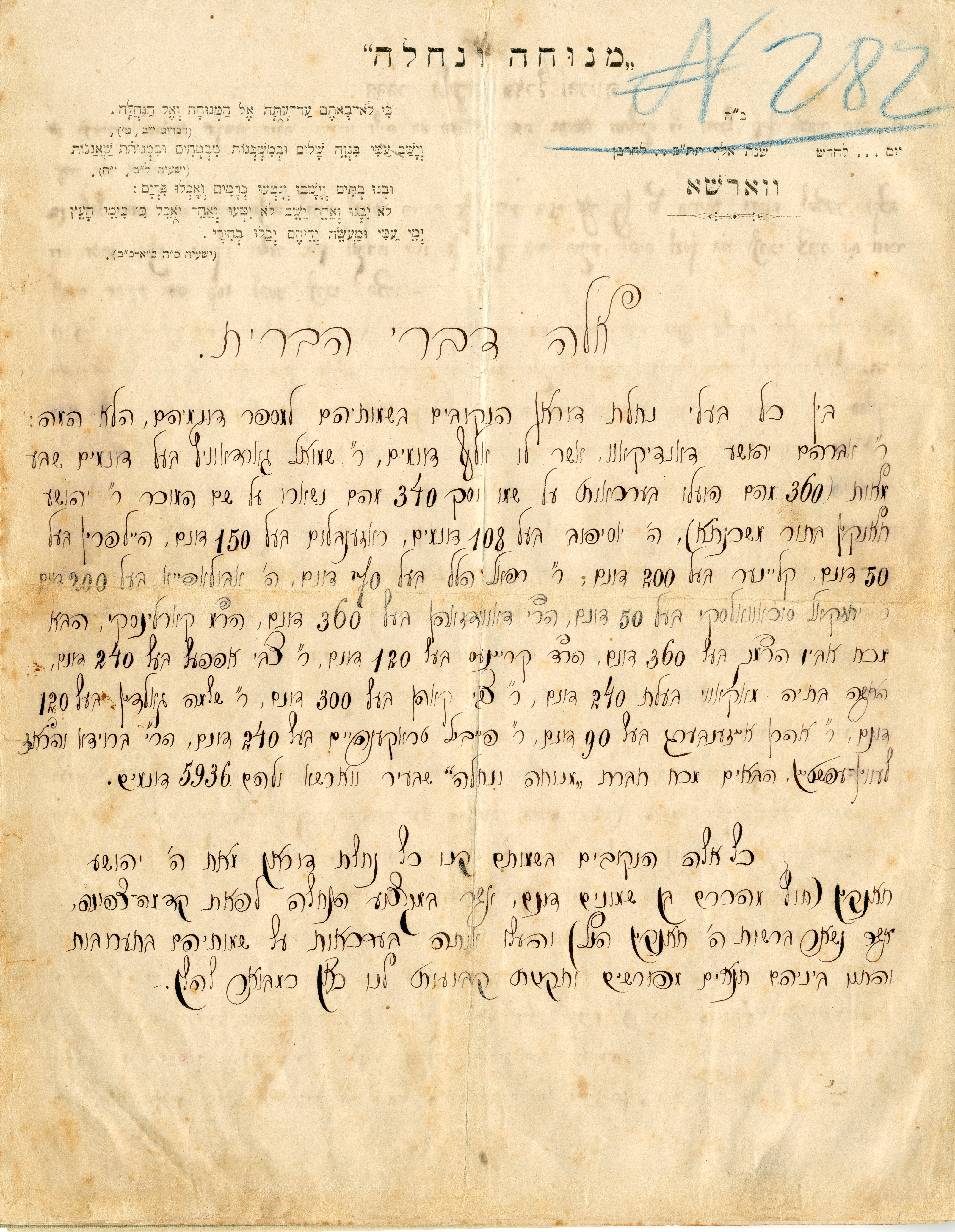 דף מתוך "ספר הברית", שנחתם על ידי מייסדי רחובות. "ספר הברית" היה המסמך החוקתי הראשון של רחובות שקבע בין השאר את העקרונות לפיהם יפעל ועד המושבה. מדובר למעשה בכתב התקשרות בין שתי קבוצות שהקימו ורכשו את הקרקע של המושבה רחובות: "היחידים" שגרו הלכה למעשה במושבה וחברי "מנוחה ונחלה". המסמך נכתב בורשה בשנת 1890. ספר הברית עוסק בתקנות הנוגעות לניהול ולבניית המושבה, ביניהן: פירוט מספר הדונמים של כל בעל נחלה, סדרי הקמת הבתים הפרטיים, גודל הבית ומהיכן יילקחו האבנים לבנייתו, התכנון הפיזי של המושבה, הבארות ורכוש המושבה הציבורי וחובות התושבים. כמו כן, נקבע שבעלי הנחלות יישאו בהוצאות הכלליות ולא ניתנה רשות למכור נחלה או להשכירה בלי הסכמת רוב החברים. באסיפה הכללית השנייה, שהתקיימה בסוף שנת 1890, חתמו על "ספר הברית" שמונה עשרה מבעלי הקרקעות היחידים ושני נציגים מ"מנוחה ונחלה". מסמך זה שיקף את האינטרסים של אגודת "מנוחה ונחלה", שחבריה לא התגוררו ברחובות והבטיח שיהיה להם ייצוג נאות בוועד בהתאם להיקף היחסי של נחלותיהם. באדיבות ארכיון רחובות.